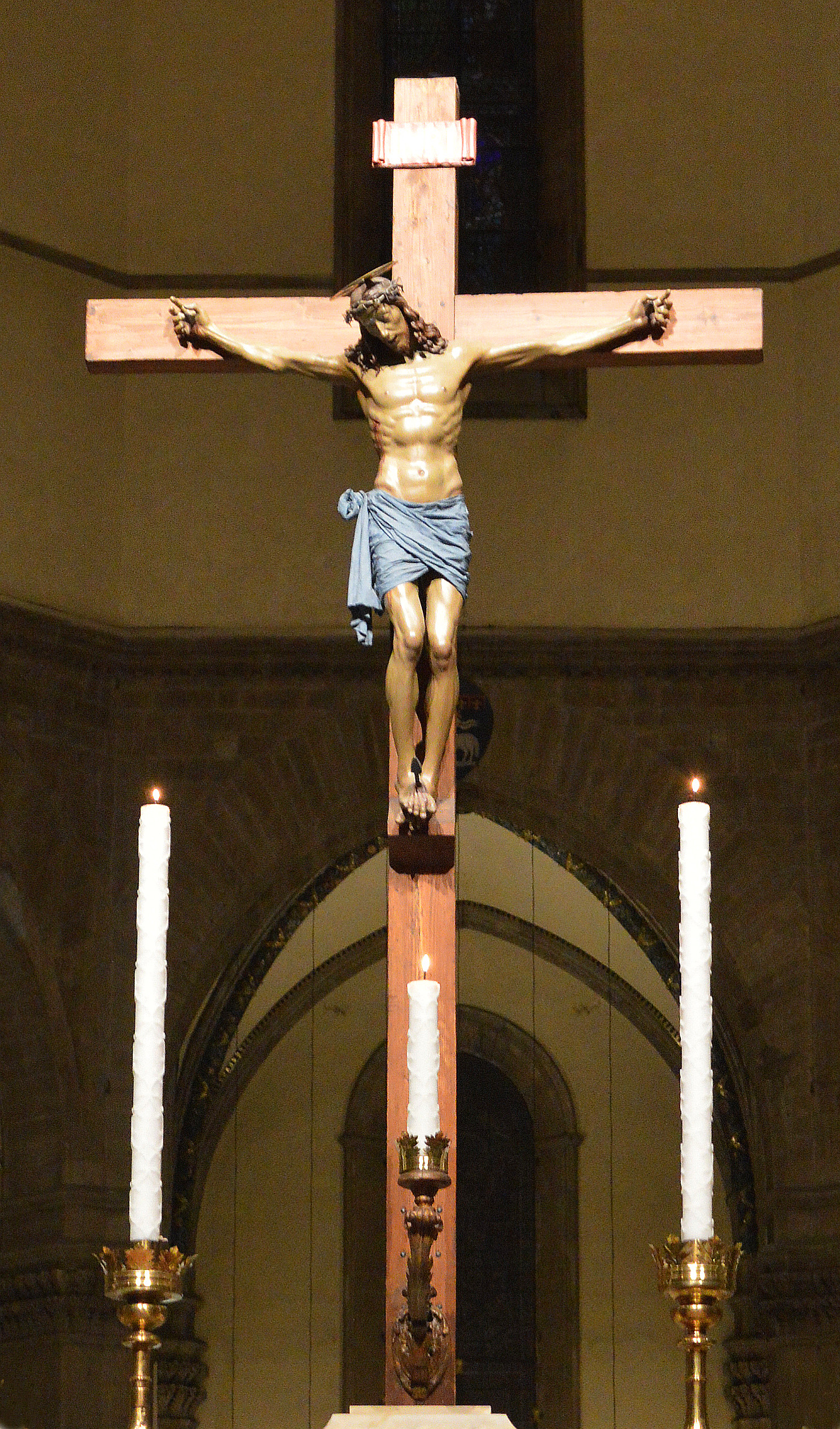 Crocifisso dell'altare maggiore del duomo di Firenze, opera di Benedetto da Maiano (1495 circa).